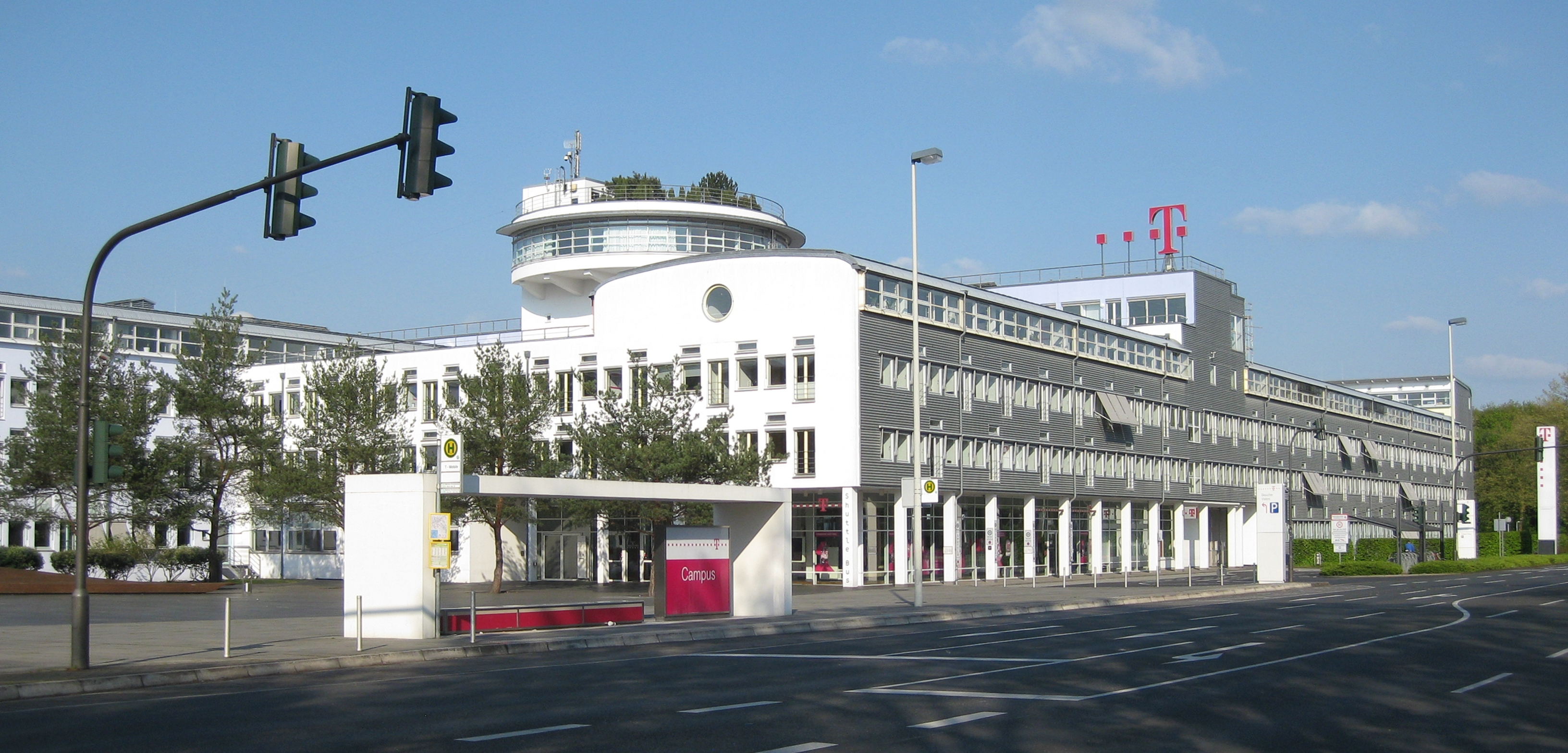 Gebäudekomplex (inkl. Telekom-Shop, Büros, Technik, Konferenzräume, Veranstaltungsfoyer, Kantine, Kinderbetreuung, Fitnessbereich) der Deutschen Telekom/Telekom Deutschland GmbH auf dem Telekom Campus, Landgrabenweg 151, Bonn-Beuel-Limperich; ehemalige Zentrale der vormals eigenständigen Geschäftseinheit Mobilfunk (damalige Firmierungen: Deutsche Telekom Mobilfunk/DeTeMobil/T-Mobil/T-Mobile/T-Mobile International). Die Grenze zwischen den Beueler Ortsteilen Limperich und Ramersdorf verläuft quer über das Grundstück.